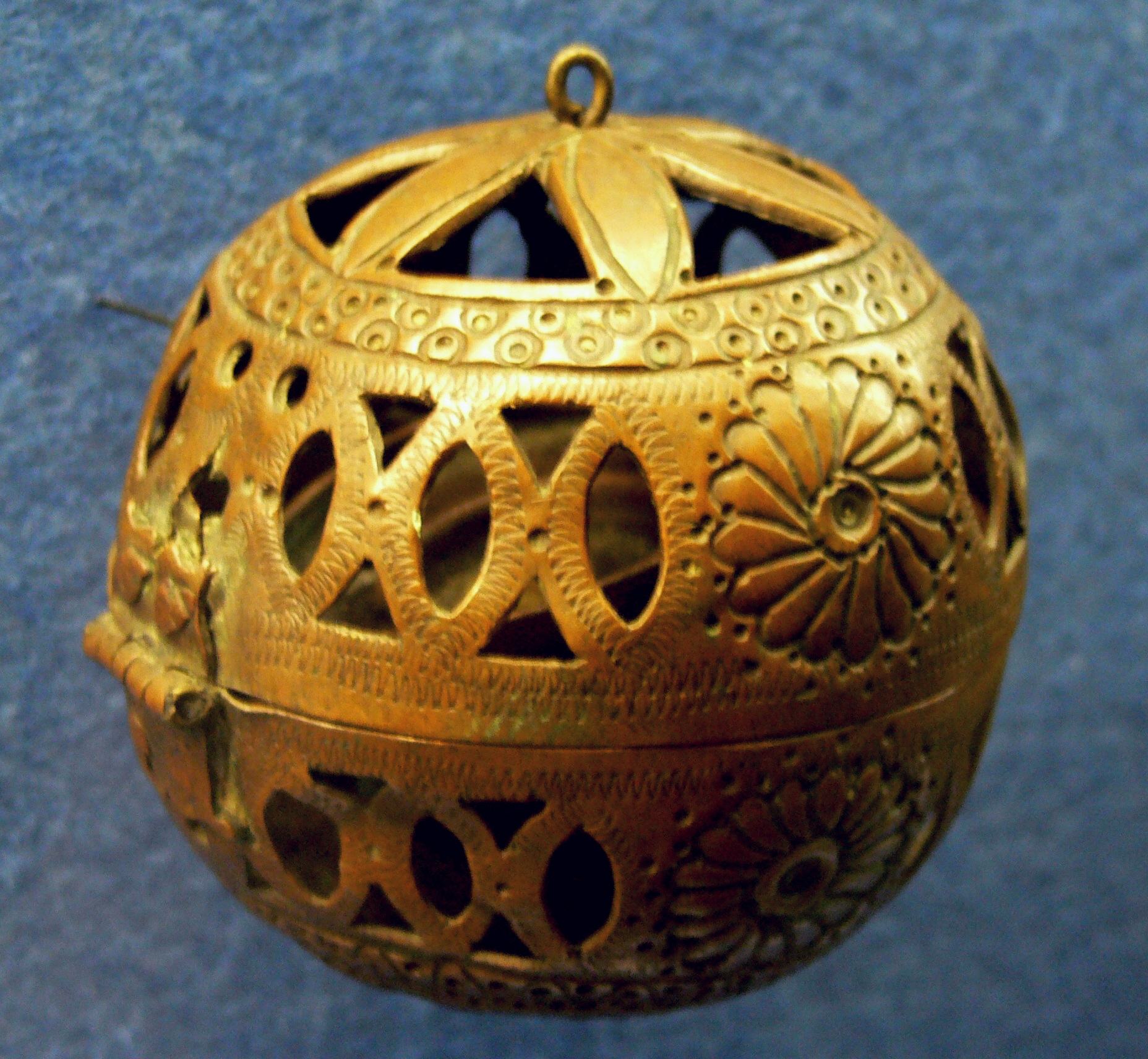 Schaffhausen, Museum zu Allerheiligen, Dauerausstellung zur Klostergeschichte Wärmeapfel (Wärmekugel, Handwärmer) aus Kloster Allerheiligen, 15. Jh., (zwei durchbrochene Halbkugeln aus Kuper zur Aufnahme glühender Kohlen); Inv. Nr. 5385